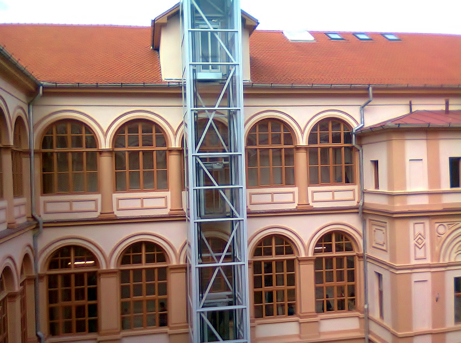 Lift de sticlă în una din curţile interioare ale Colegiului Naţional "Moise Nicoară" din Arad.